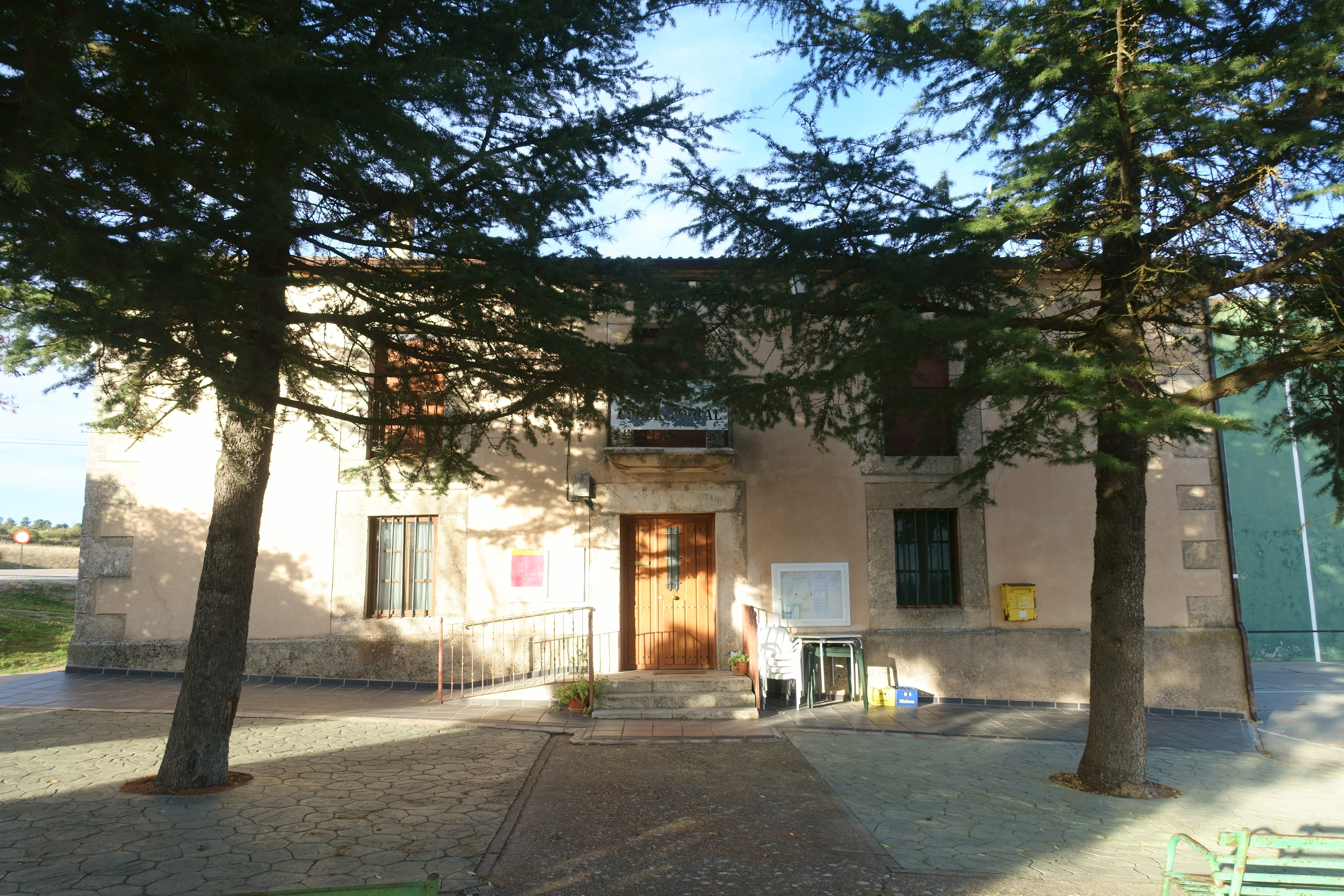 Casa consistorial de Carabias (Segovia, España).